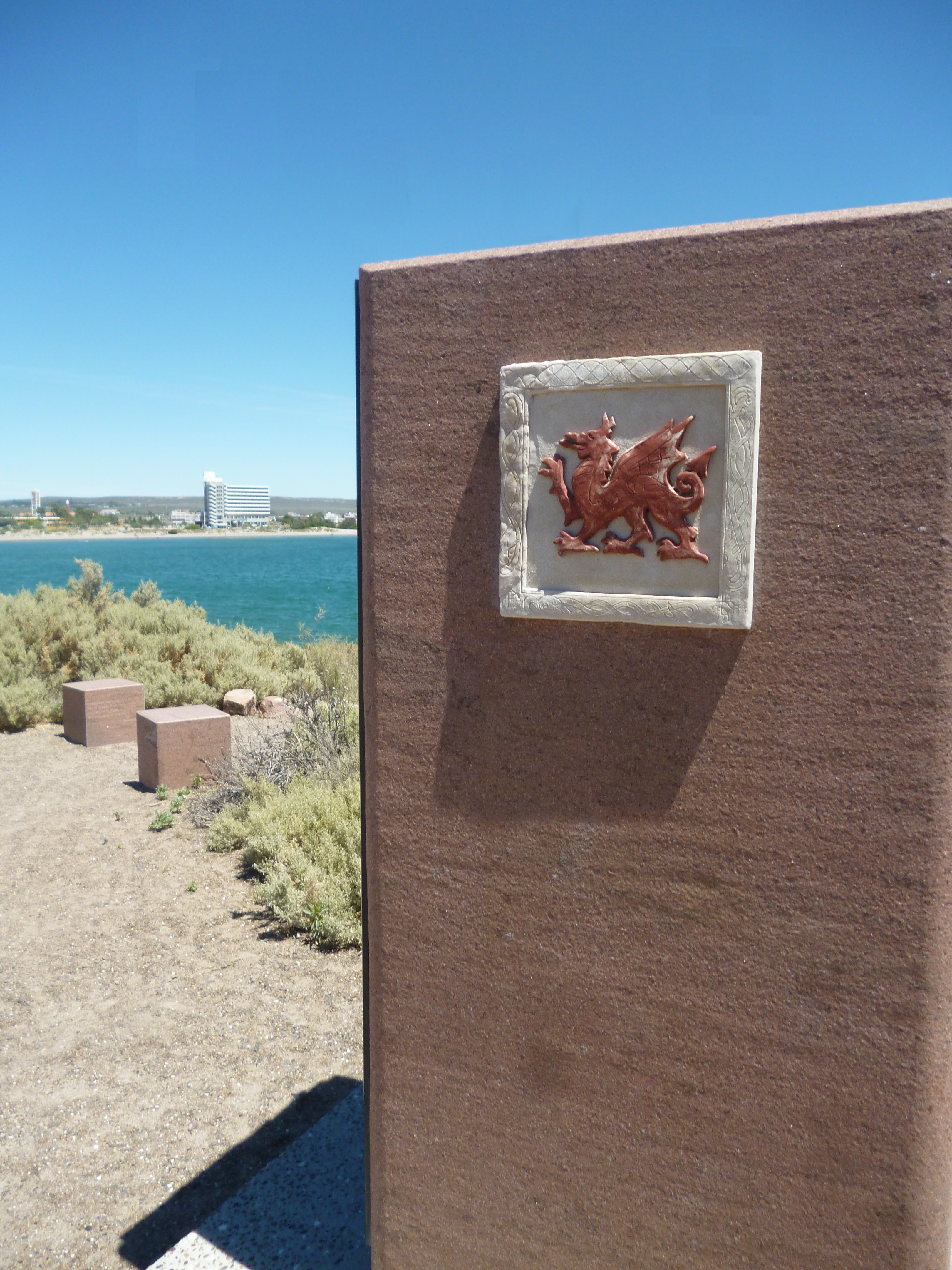 Monumento al desembarco galés, Punta Cuevas, Y Wladfa. La placa contiene los nombres de todos los colonos llegados en el Mimosa